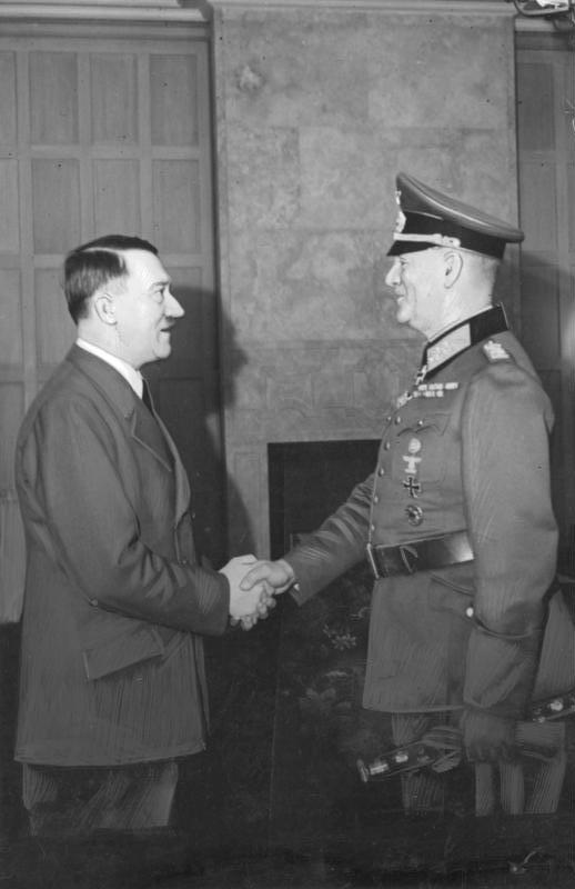 Adolf Hitler und Wilhelm Keitel Zentralbild Generalfeldmarschall und Chef des Oberkommandos der Wehrmacht Wilhelm Keitel geb: 22.9.1882 in Helmscherode gest: hingerichtet am 16.10.1946 in Nürnberg UBz: Adolf Hitler gratuliert Wilhelm Keitel zu dessen 40-jährigem Militärdienstjubiläum am 9. März 1941 Abgebildete Personen: Hitler, Adolf: Reichskanzler, Deutschland Keitel, Wilhelm: Generalfeldmarschall, Ritterkreuz (RK), Heer, Deutschland (GND 118721577)